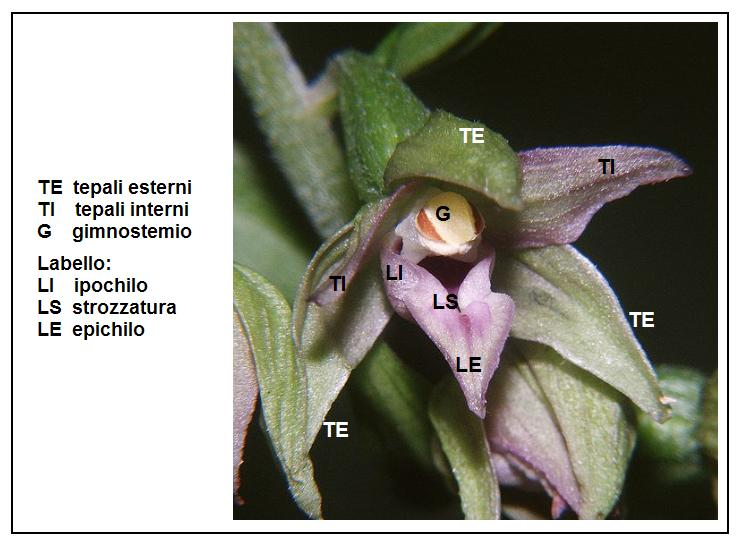 Epipactis leptochila